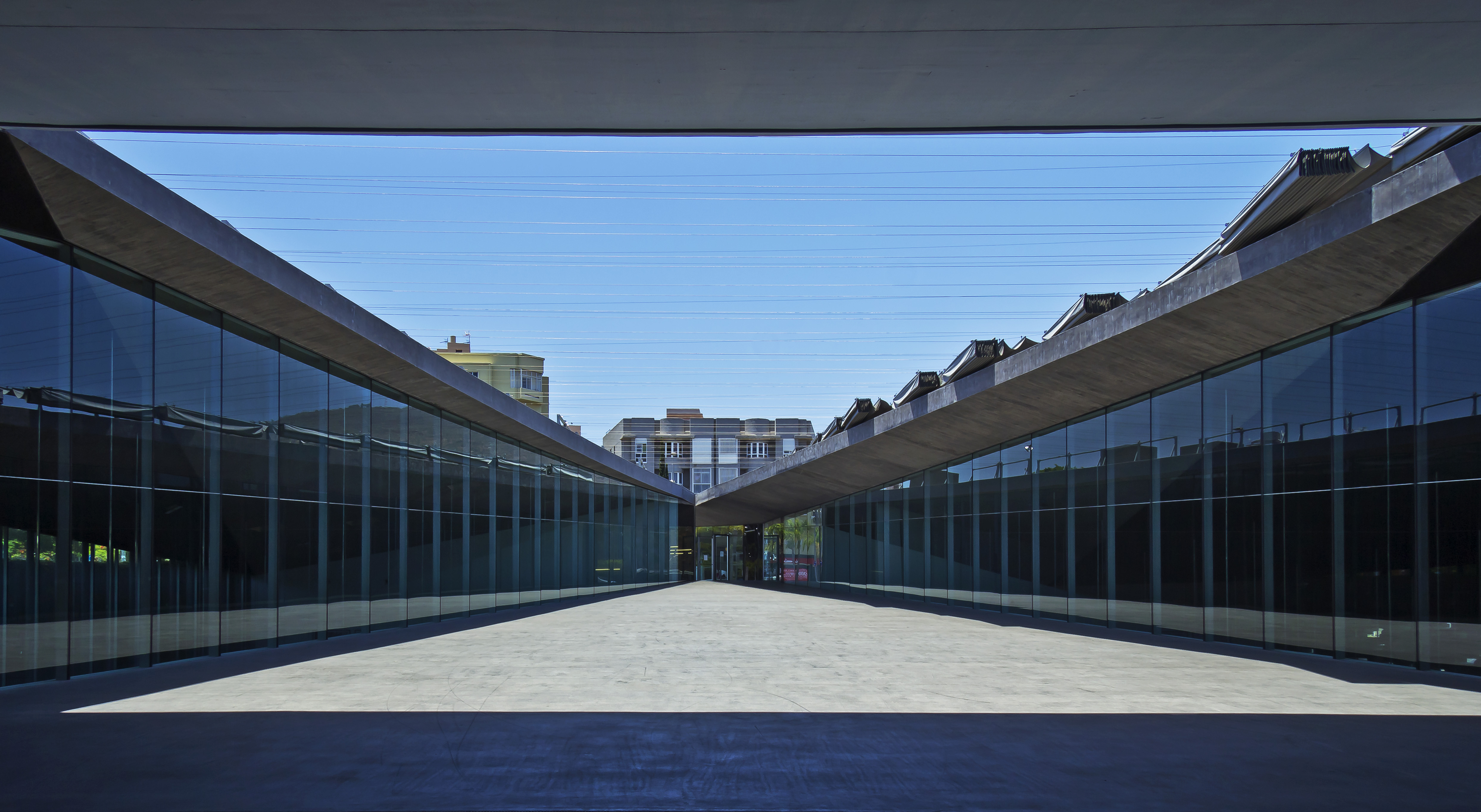 Innenhof des Gebäudes des TEA (Tenerife Espacio de las Artes) in Santa Cruz de Tenerife, Blick in Richtung Westen